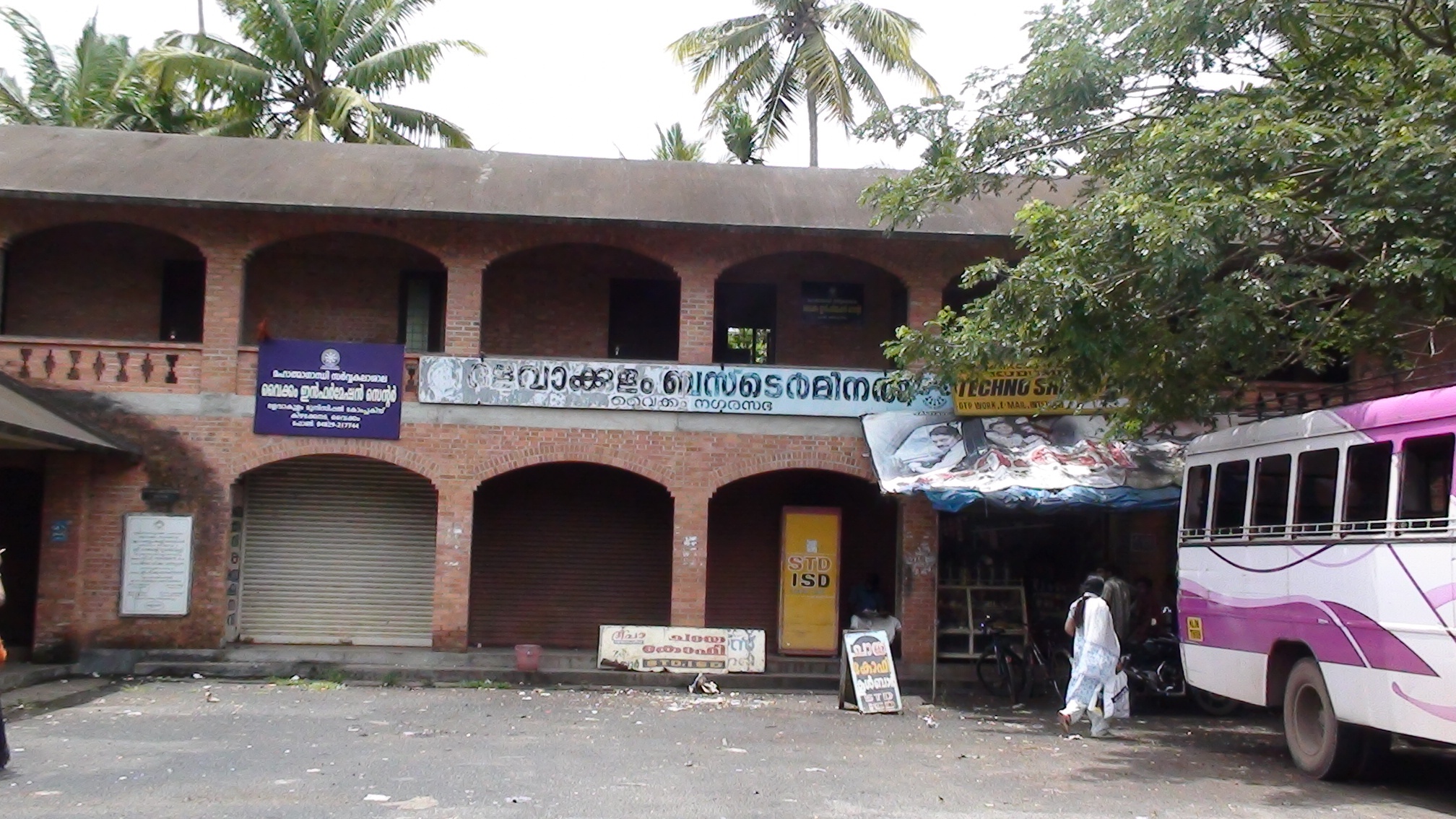 വൈക്കം കിഴക്കേനടയിലെ ദളവാക്കുളം ബസ് ടെർമിനൽ